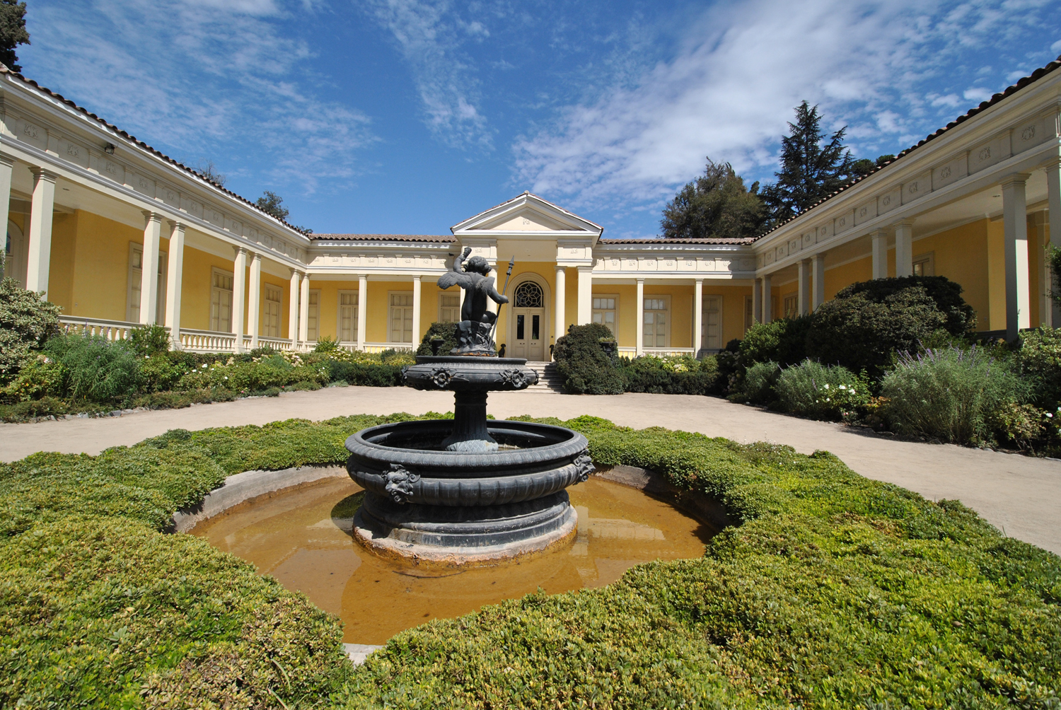 Viña Concha y Toro - Pirque. This is a photo of a national monument in Chile: 812